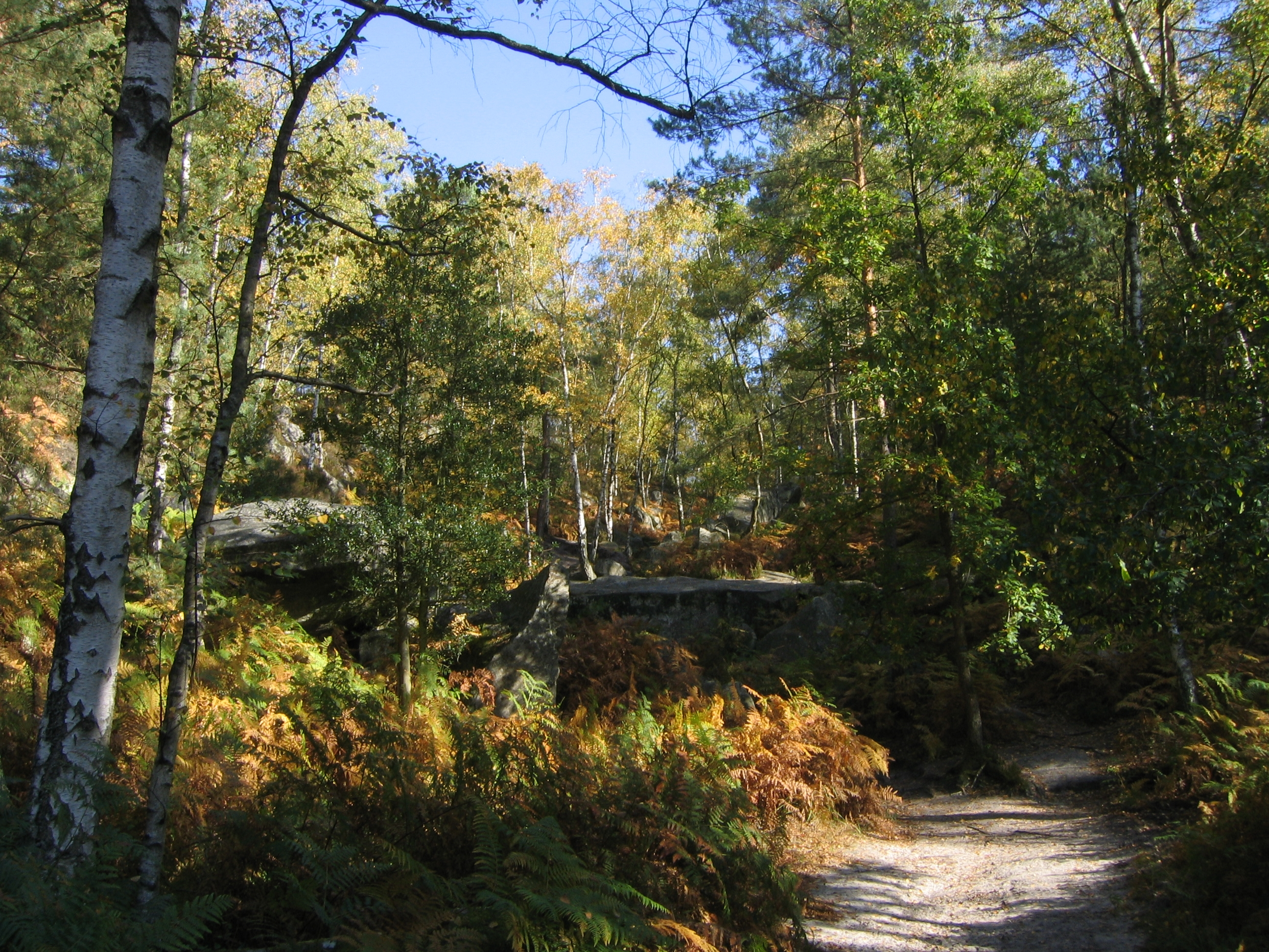 Vue de la forêt de Fontainebleau, le sous-bois